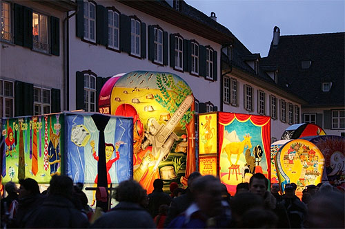 Basler Fasnacht 05: Ladäärne-Uustellig (Münsterplatz)